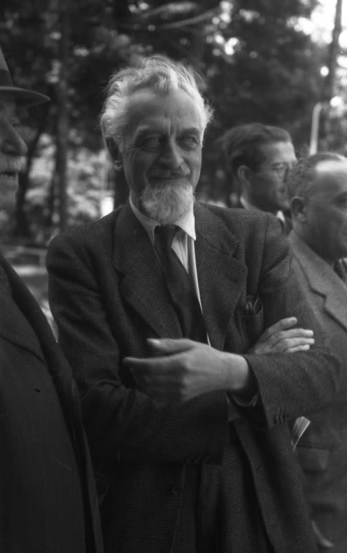 Ministerpräsidenten-Konferenz der Länder der 3 Westzonen Deutschlands auf dem Berghotel Rittersturz in Koblenz (Dr. Hermann Lüdemann) 8.-10.7.1948